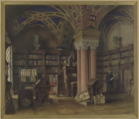 Кабинет Фауста. О.Кочеткова. 1880